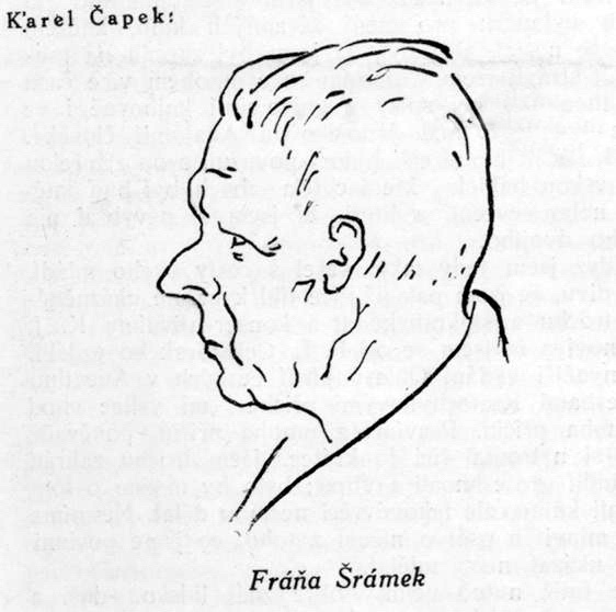 Cartoon of Fráňa Šrámek (1877 - 1952), Czech poet.